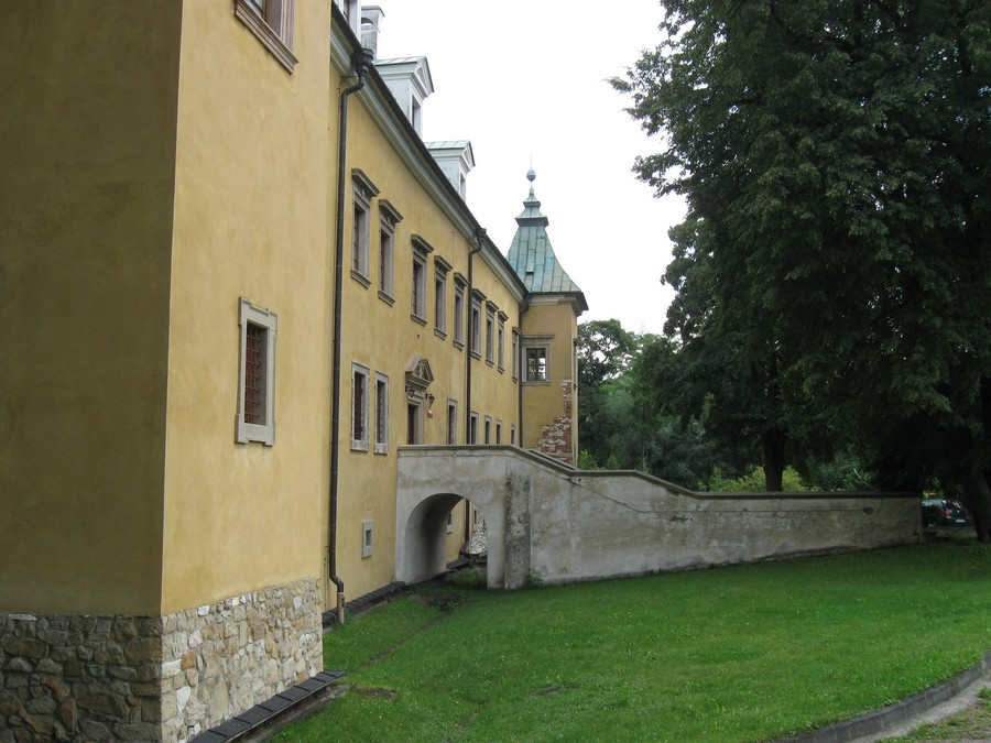 Spytkowice - zespół zamku, 1520-1546, 1622-1643, 1953